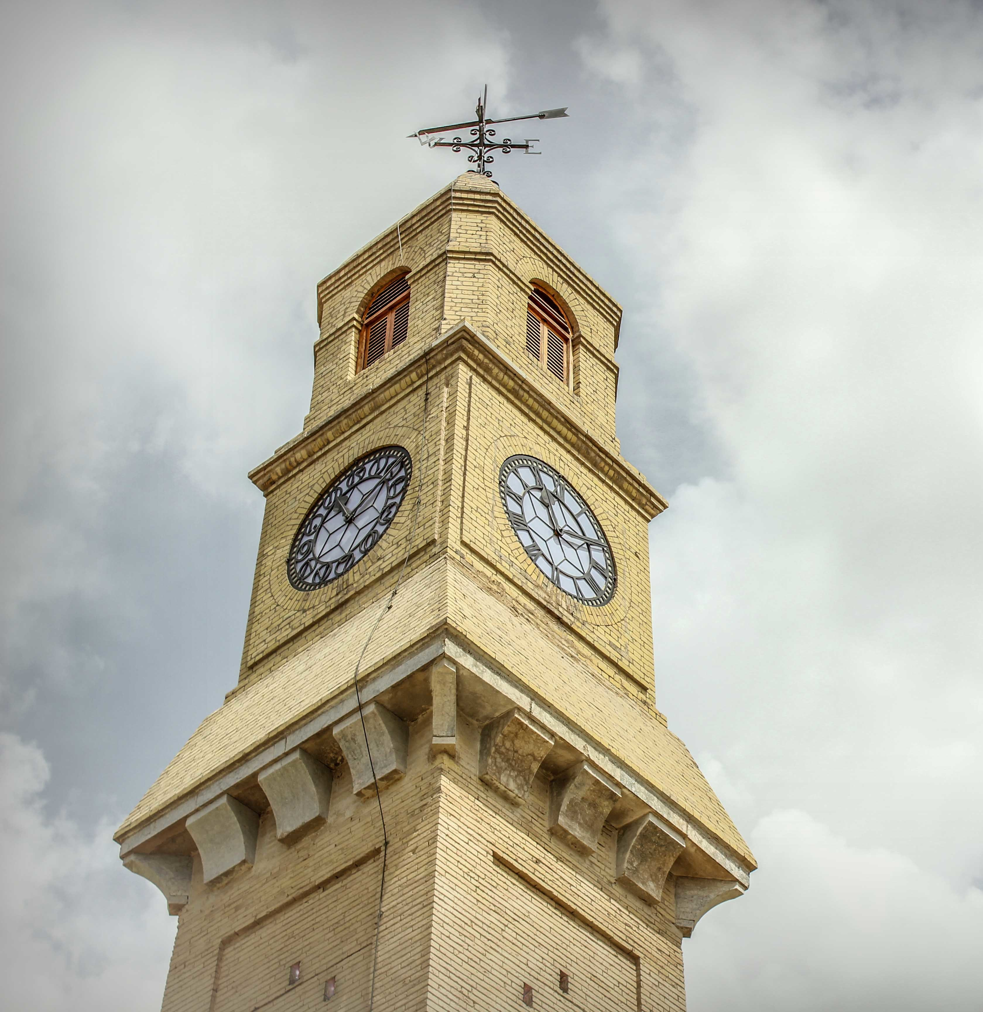 برج ساعة مبنى القشلة في بغداد ويقع في المدرسة الموفقية التي بناها موفق الخادم ولقد بني البرج في العهد العثماني